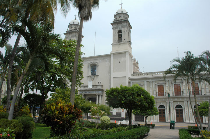 Basílica Menor de Colima